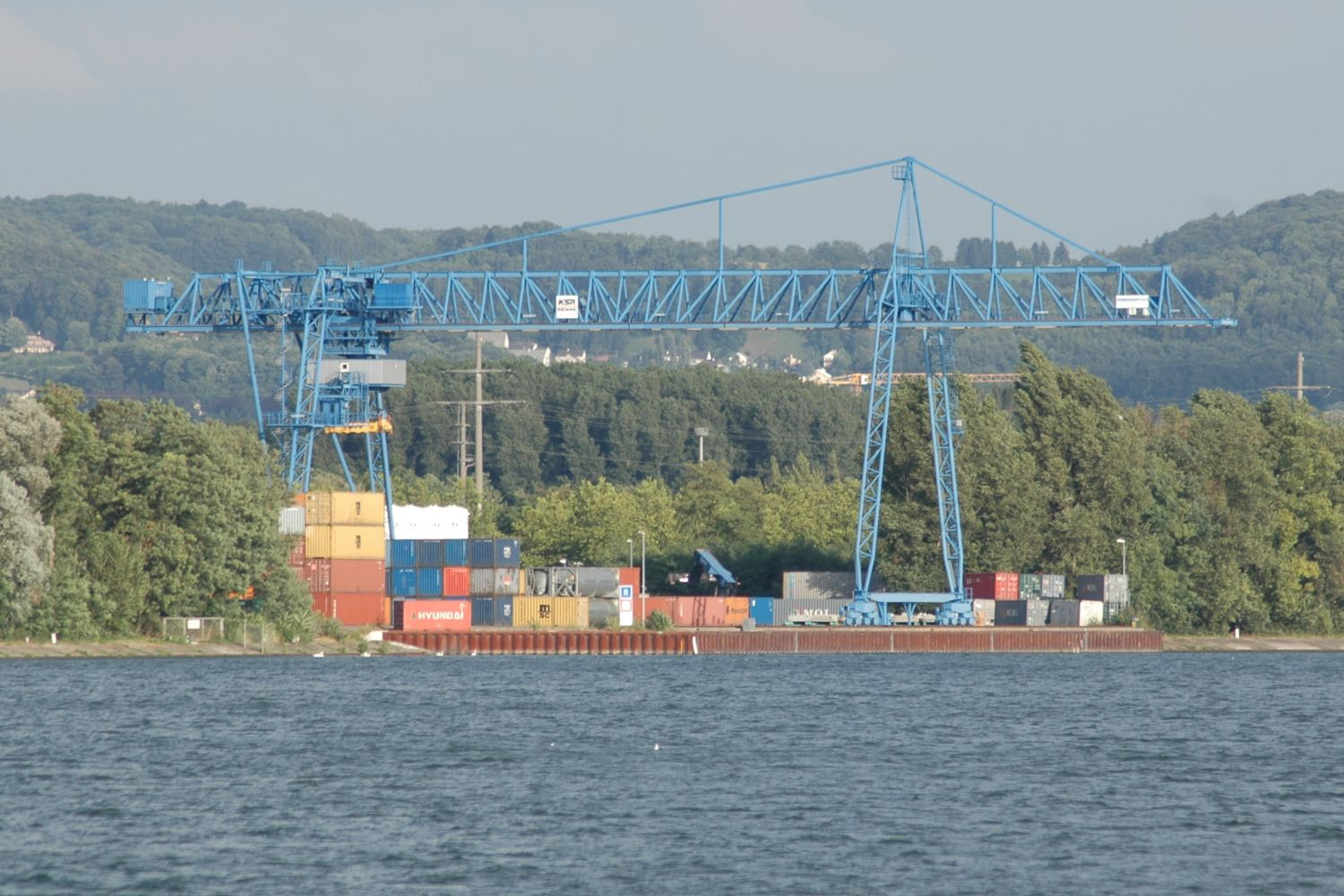 Containerumschlag im Rheinhafen in Weil am Rhein, Baden-Württemberg, Deutschland.